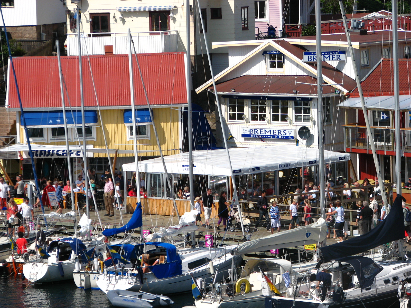 Vansviken, Smögen